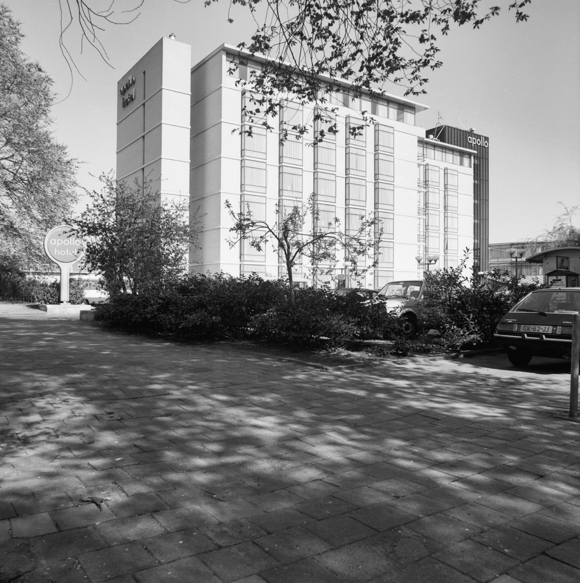 Hotel Apollolaan, overzicht